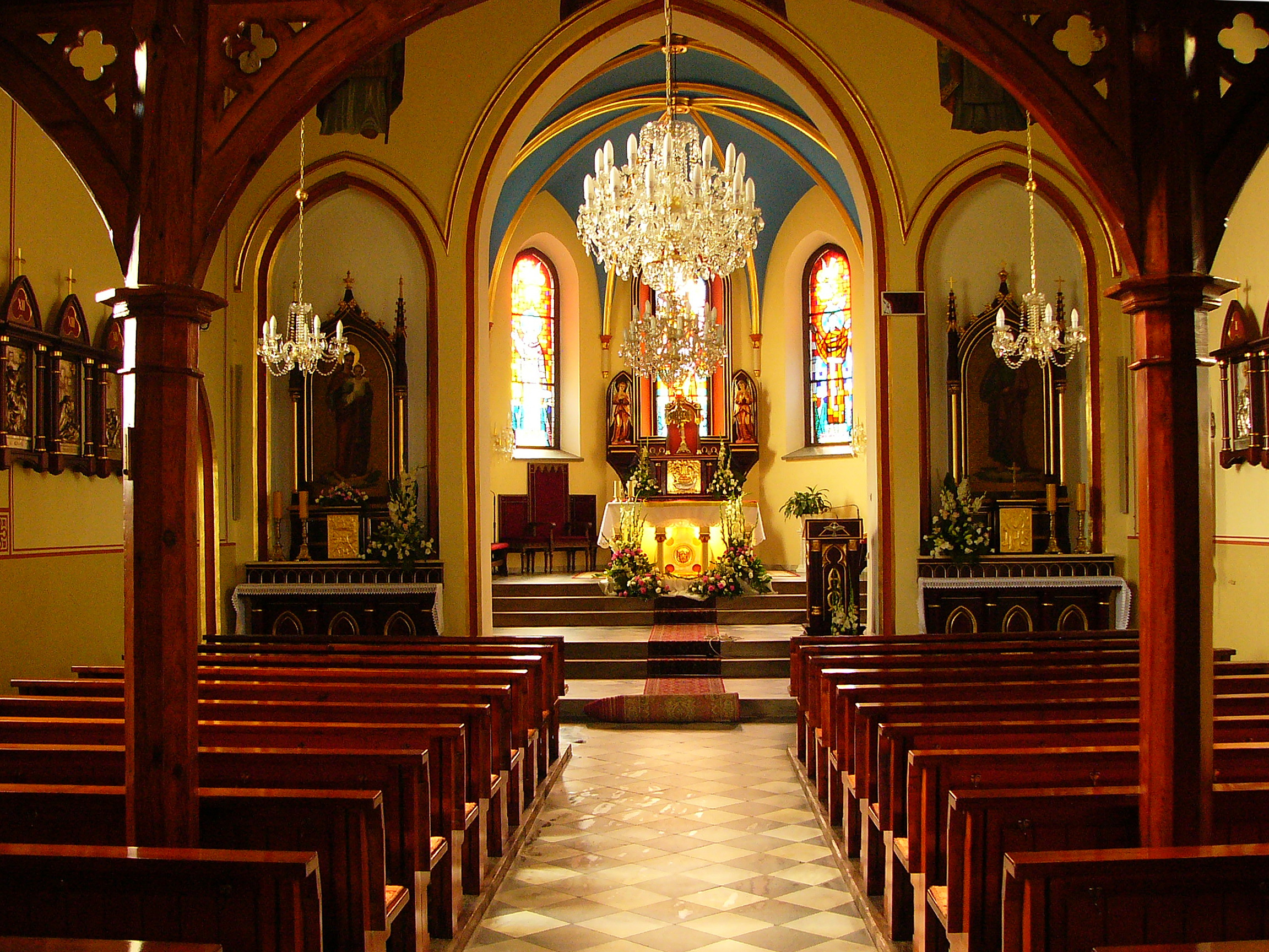 Dobra, ul. Szkolna 7 - rzymskokatolicki kościół parafialny pw. św. Jana Chrzciciela, 3 ćw. XIX